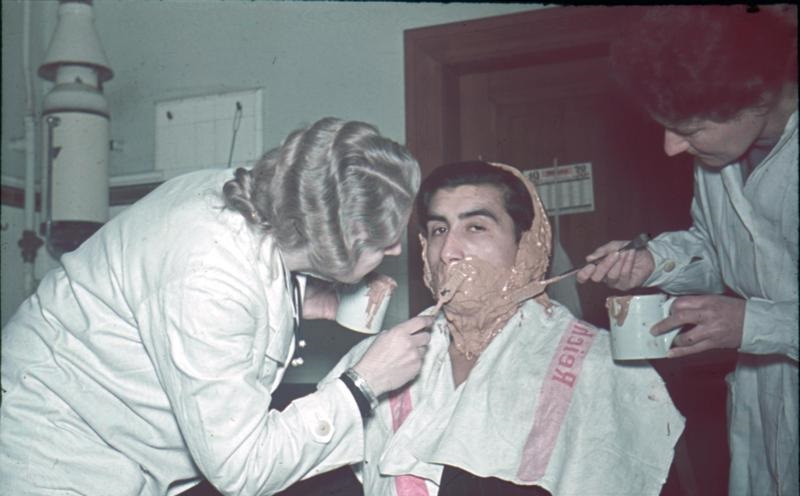 Gesichtsabformung bei einem Mann Rassehygienische und Kriminalbiologische Forschungsstelle des Reichsgesundheitsamtes.- zwei Frauen mit weißem Kittel (Krankenschwestern, u.a. Eva Justin?) beim Abformen des Gesichts eines Mannes (Sinti/Roma?)